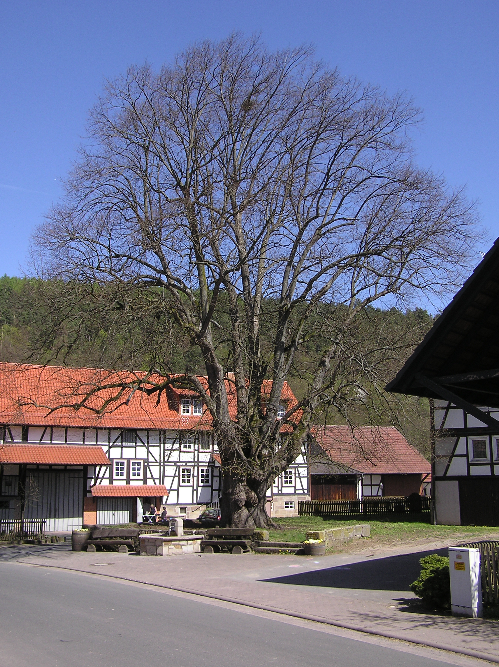 Linde in Aua (Orteil von Neuenstein (Hessen)